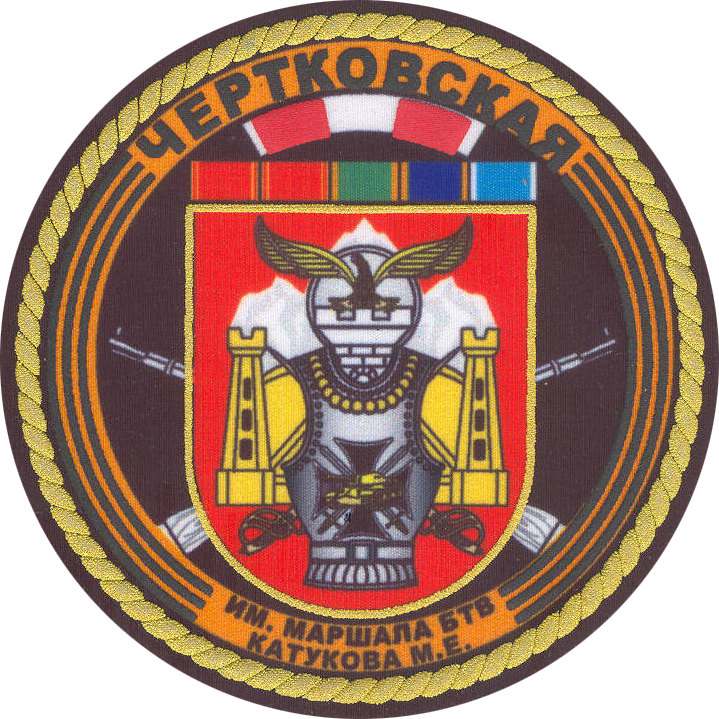 Нарукавный знак 8-й ОМСБр (Борзой)